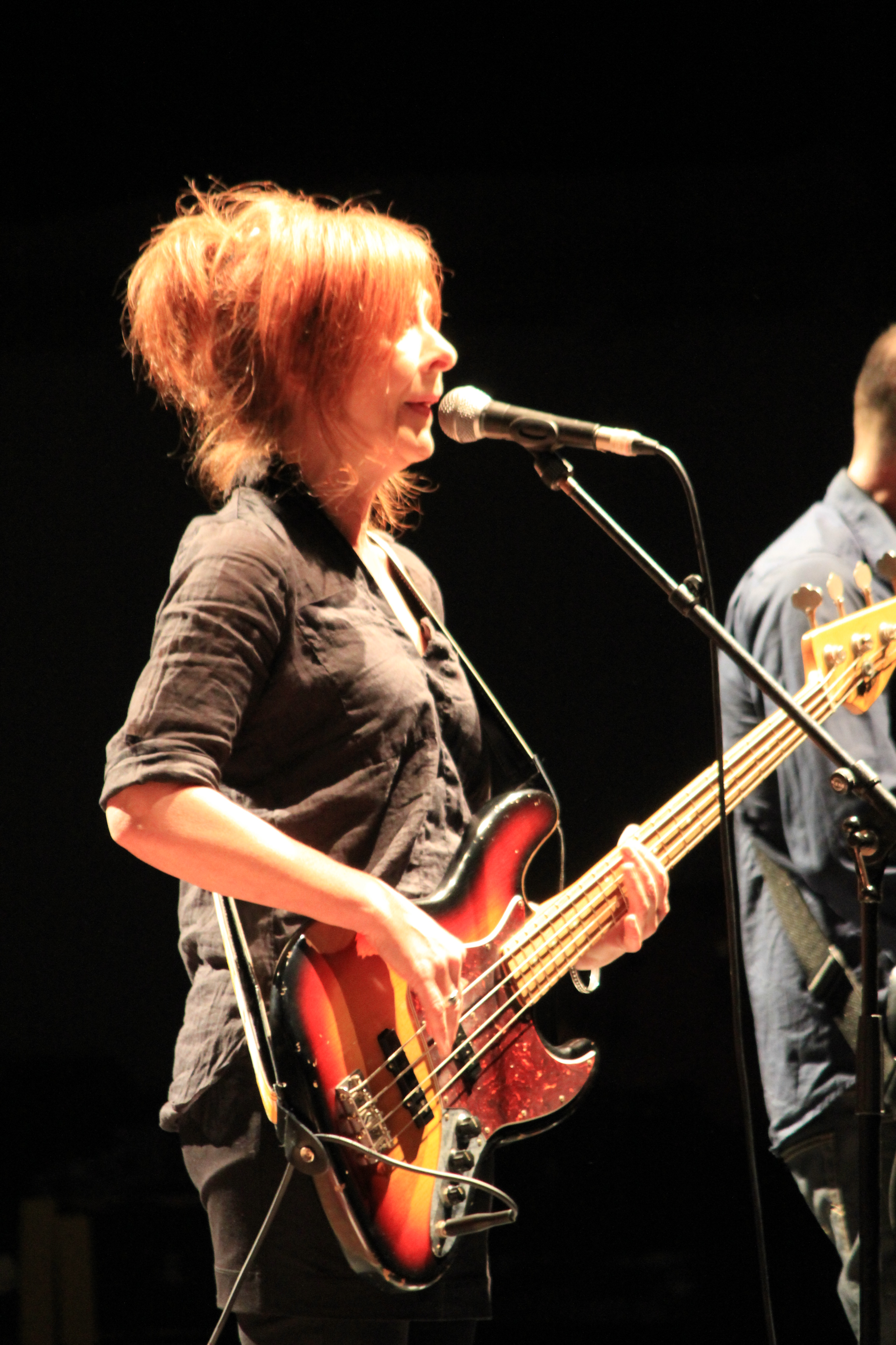 Clare Kenny, pendant le concert de Sinéad O'Connor lors du Festival interceltique de Lorient, le 10 août 2013.